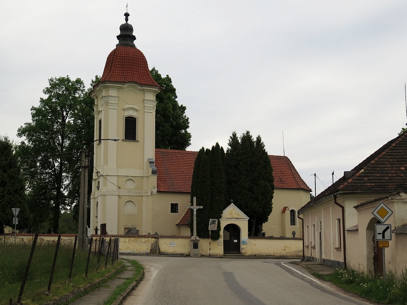 Kostel svatých Mikuláše a Linharta, Dolní Slověnice.